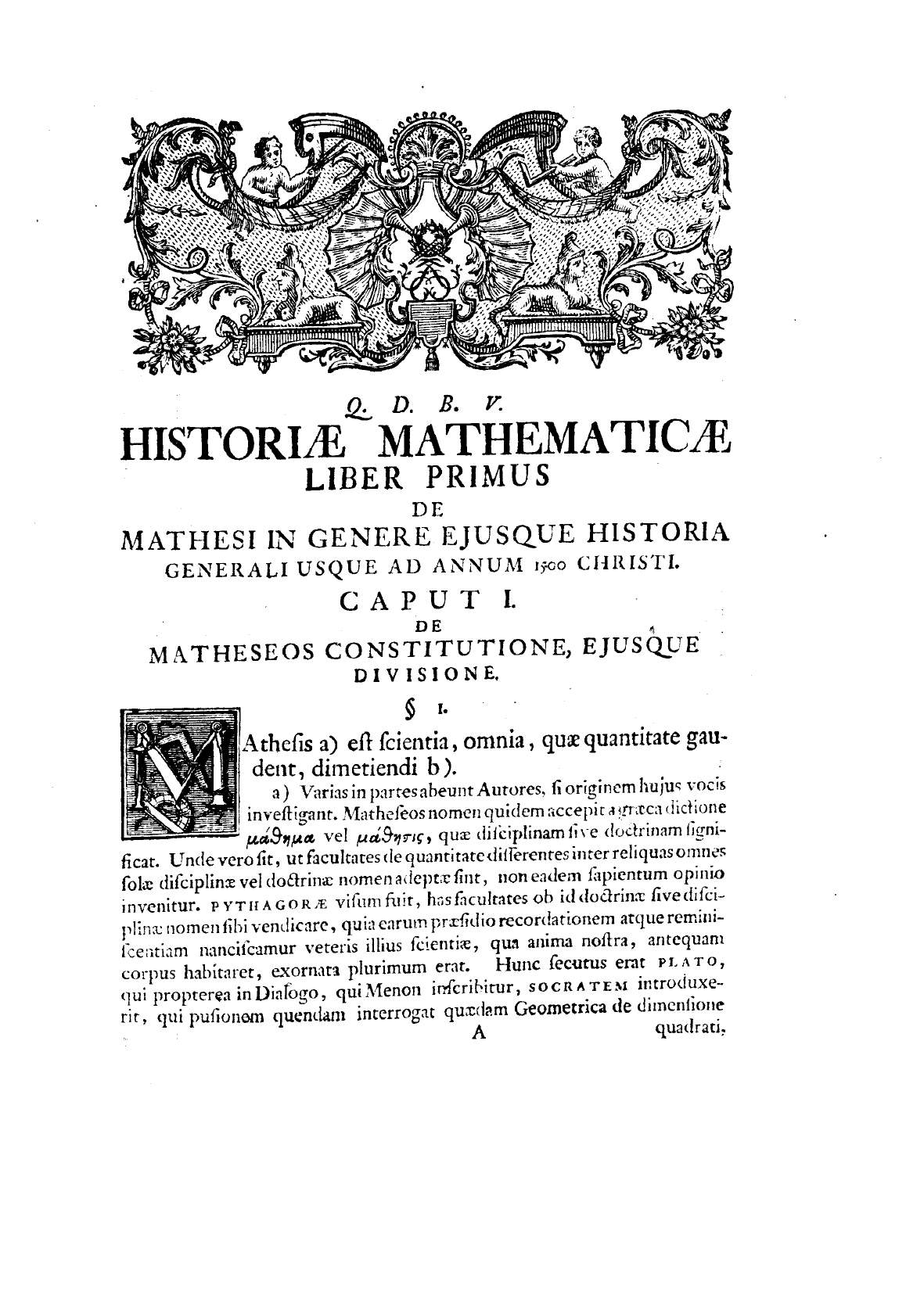 Historia matheseos universae a mundo condito ad seculum p.C.n. 16. praecipuorum mathematicorum vitas, dogmata, scripta et manuscripta complexa. Accedit recensio elementorum, compendiorum operum et operum mathematicorum atque historia arithmetices ad nostra tempora autore Jo. Christoph. Heilbronner. - Lipsiae : impensis Joh. Friderici Gleditschii, 1742. - [8], 924, [68] p. : ill. ; 4º .